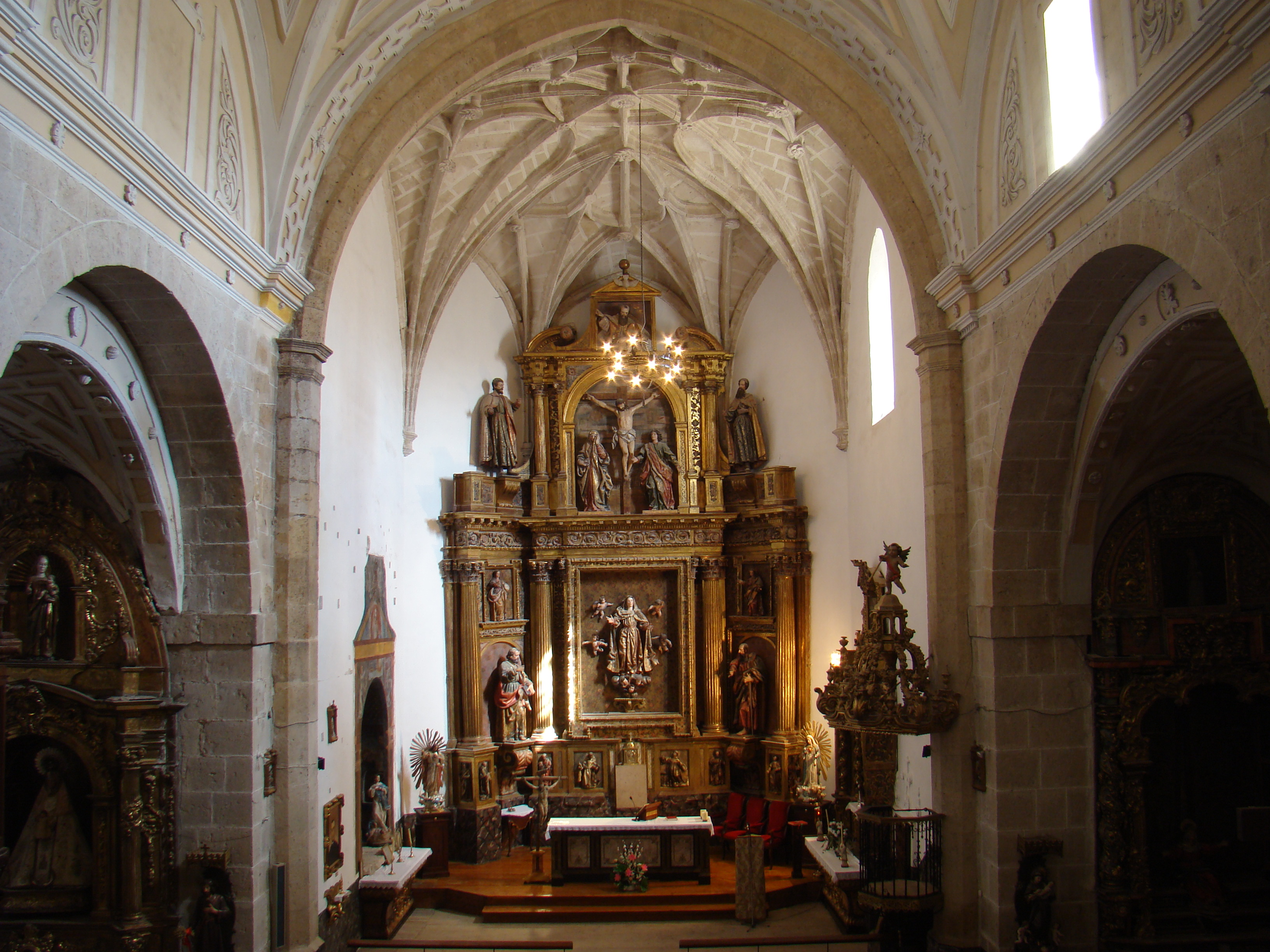 Iglesia de la Asunción de Bercero, provincia de Valladolid en España. Retablo mayor del tercer cuarto del siglo XVII, muy influido por Gregorio Fernández.